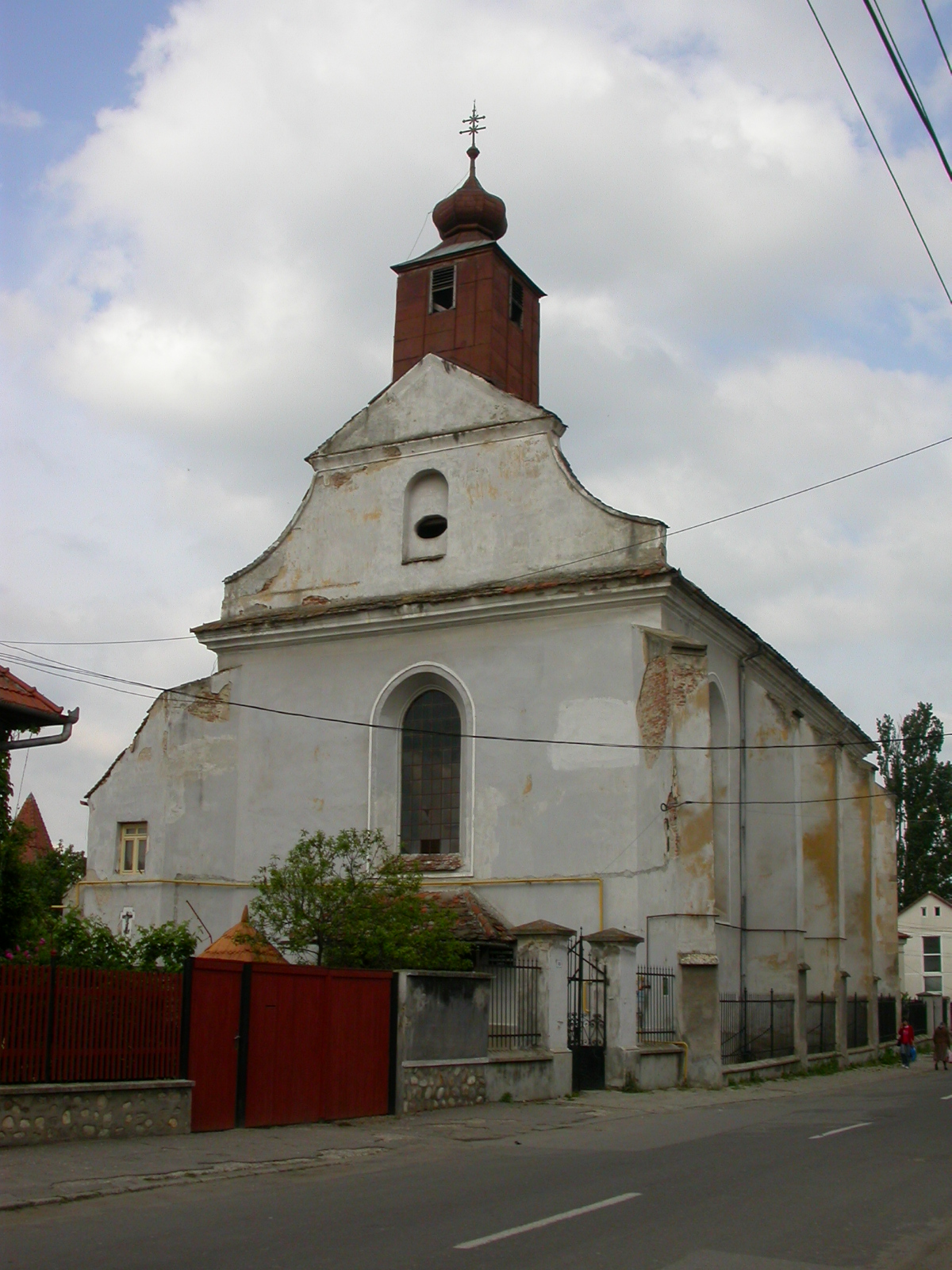 Biserica romano-catolică "Sf. Bartolomeu", sec. XIV - XVIII 01